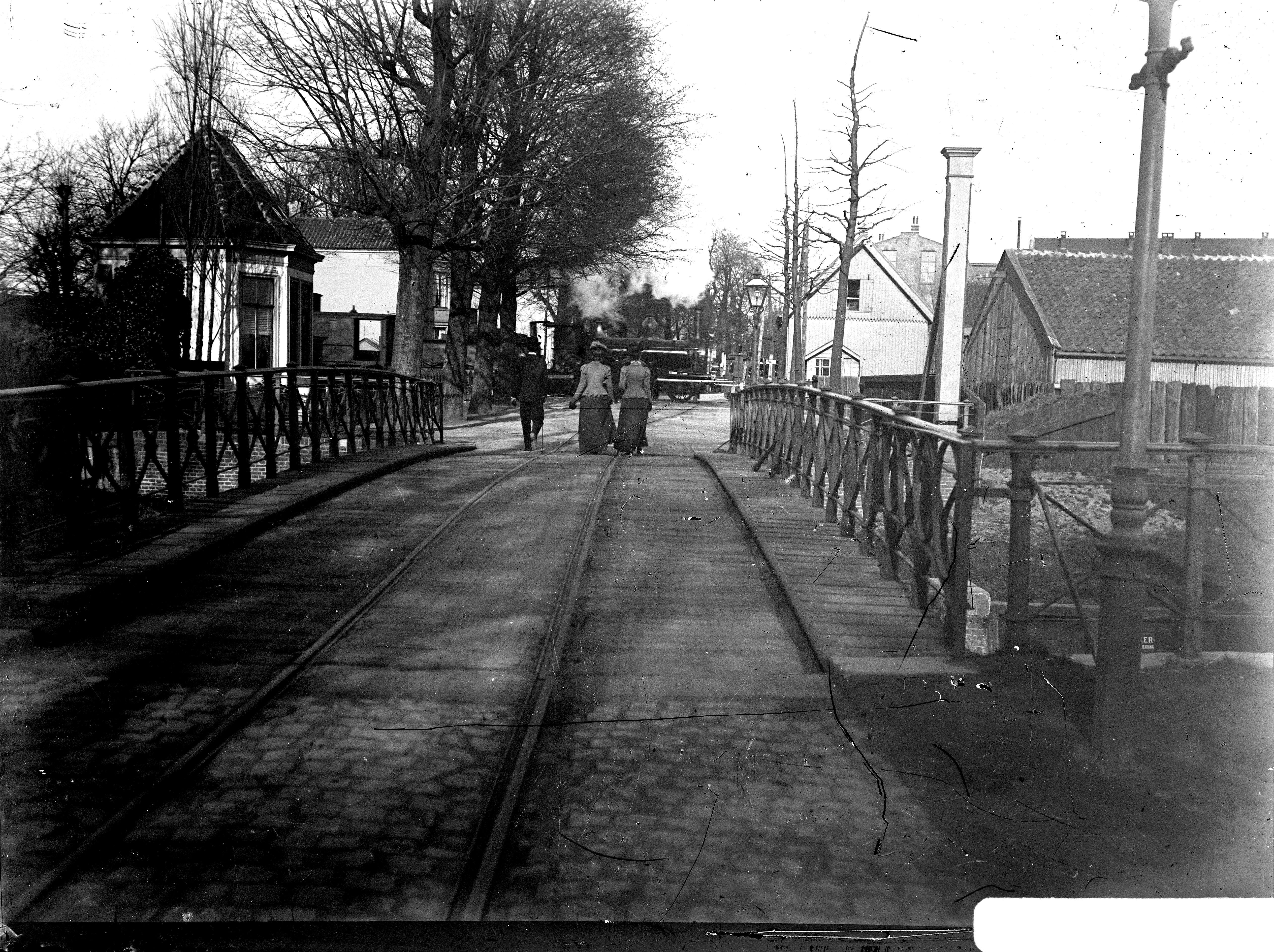 Haagweg gezien naar het noordoosten met op de voorgrond de Staatsspoorbrug met stoomtram van de lijn naar Voorschoten. Links daarachter de omhoogstekende spoorbomen van de spoorlijn Leiden-Utrecht. In de verte passeert juist een locomotief over de spoorwegovergang. Ca. 1904